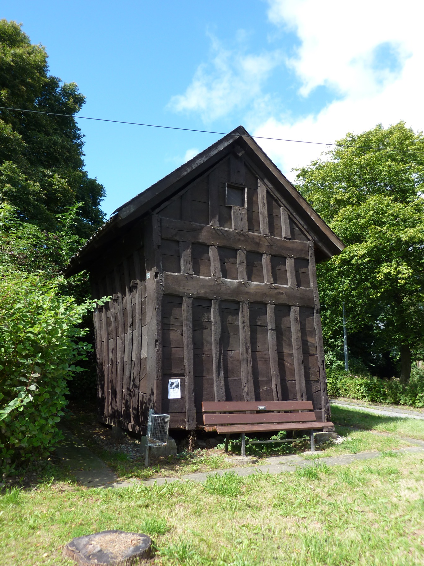 Kornkasten in Ennepetal-RüggebergThis is a photograph of an architectural monument., no. 0